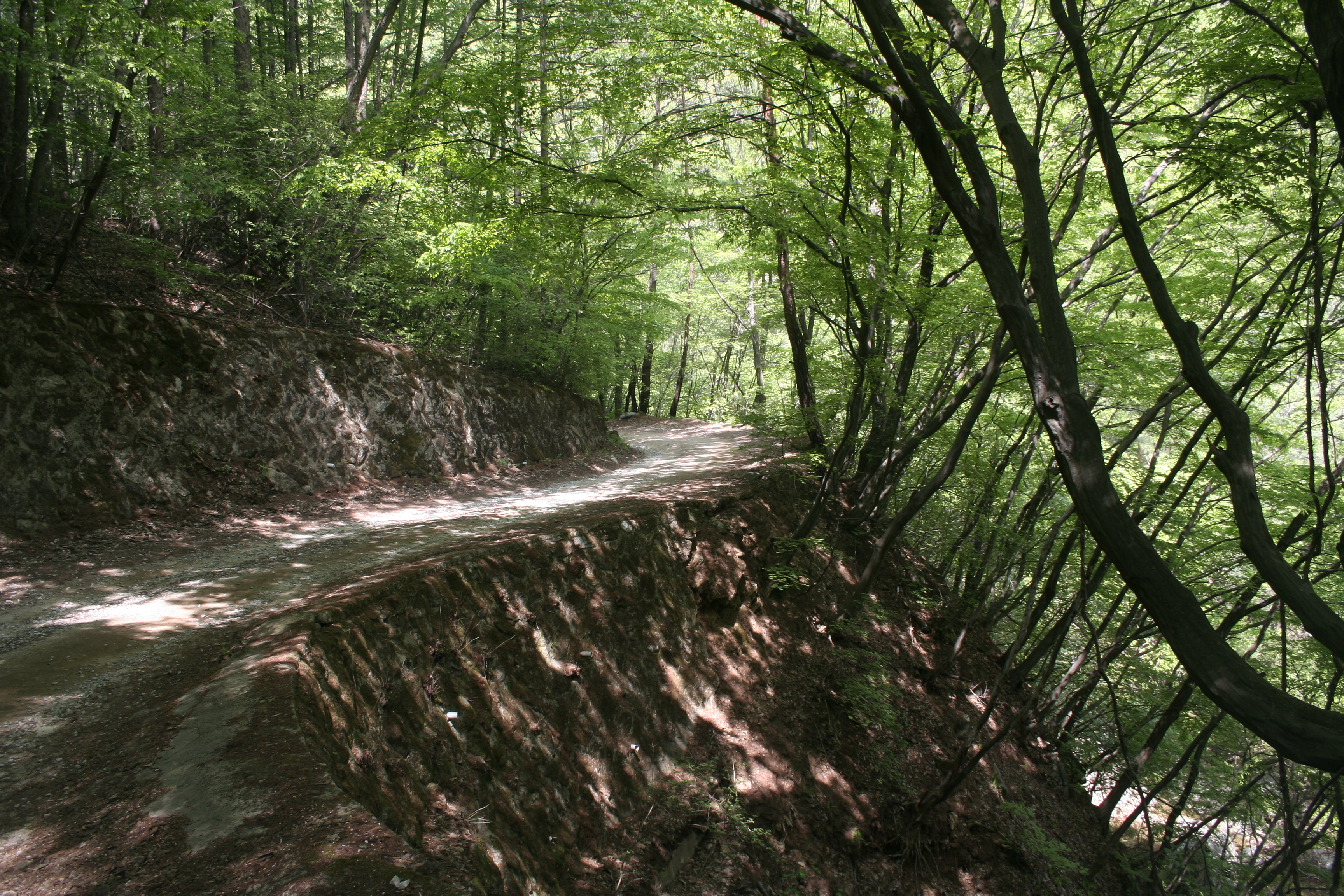 치악산 산책로. 울창한 나무들 사이로 비추는 햇빛.